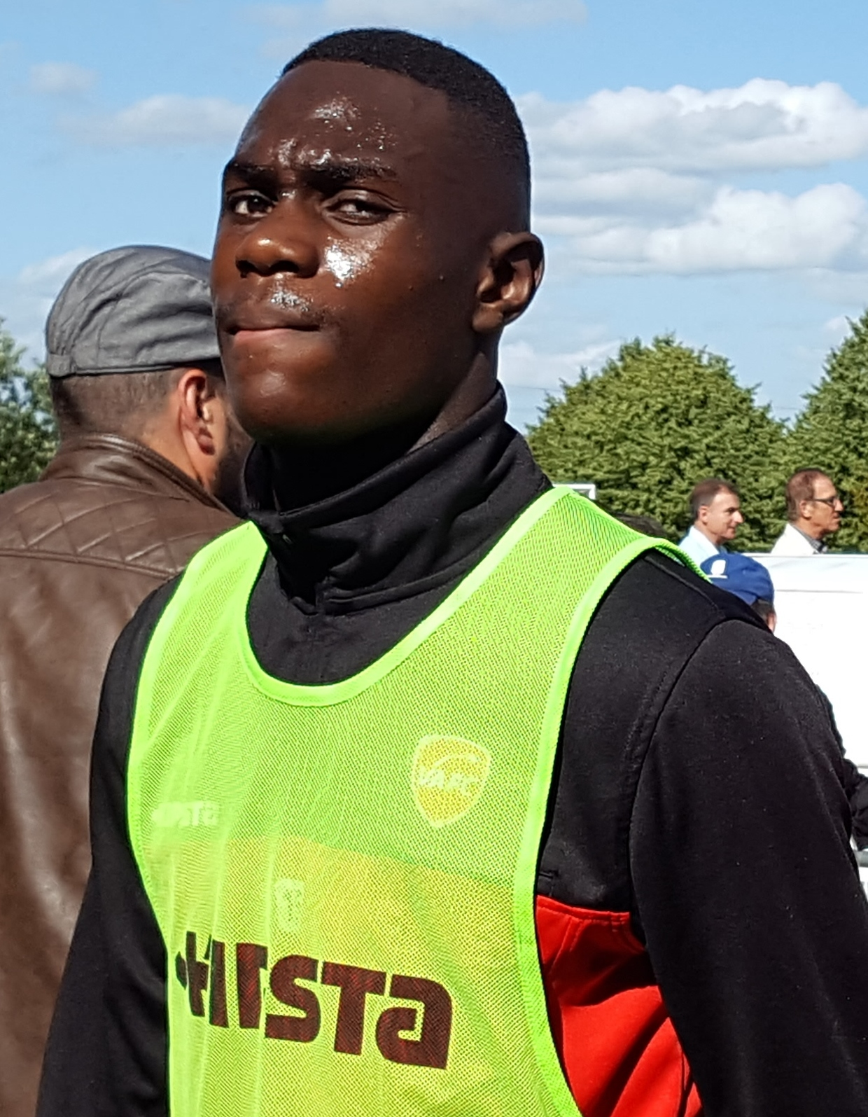 Moussa Niakhaté avant le match amical Valenciennes / UNFP FC, le 2 juillet 2016, au Stade des Navarres à Aniche.